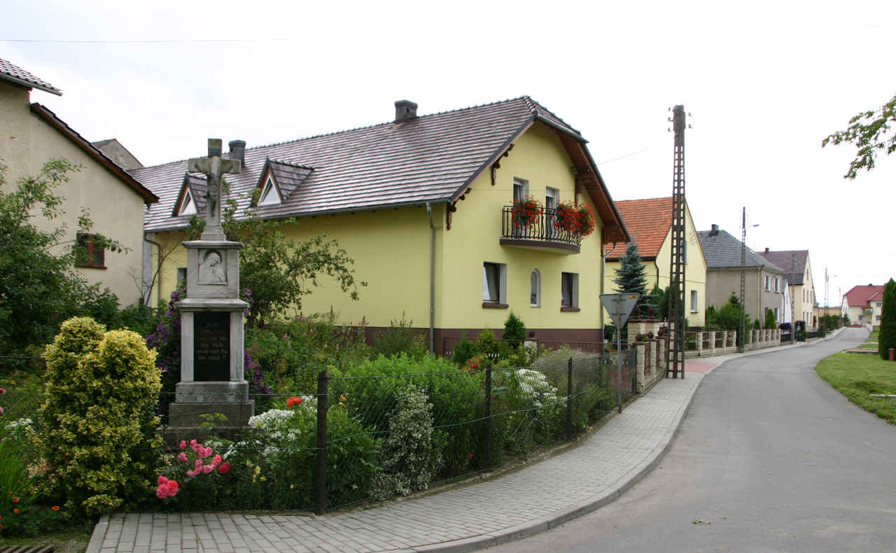 Grabina (dodatkowa nazwa w j. niem. Grabine) – wieś w Polsce położona w województwie opolskim, w powiecie prudnickim, w gminie Biała.